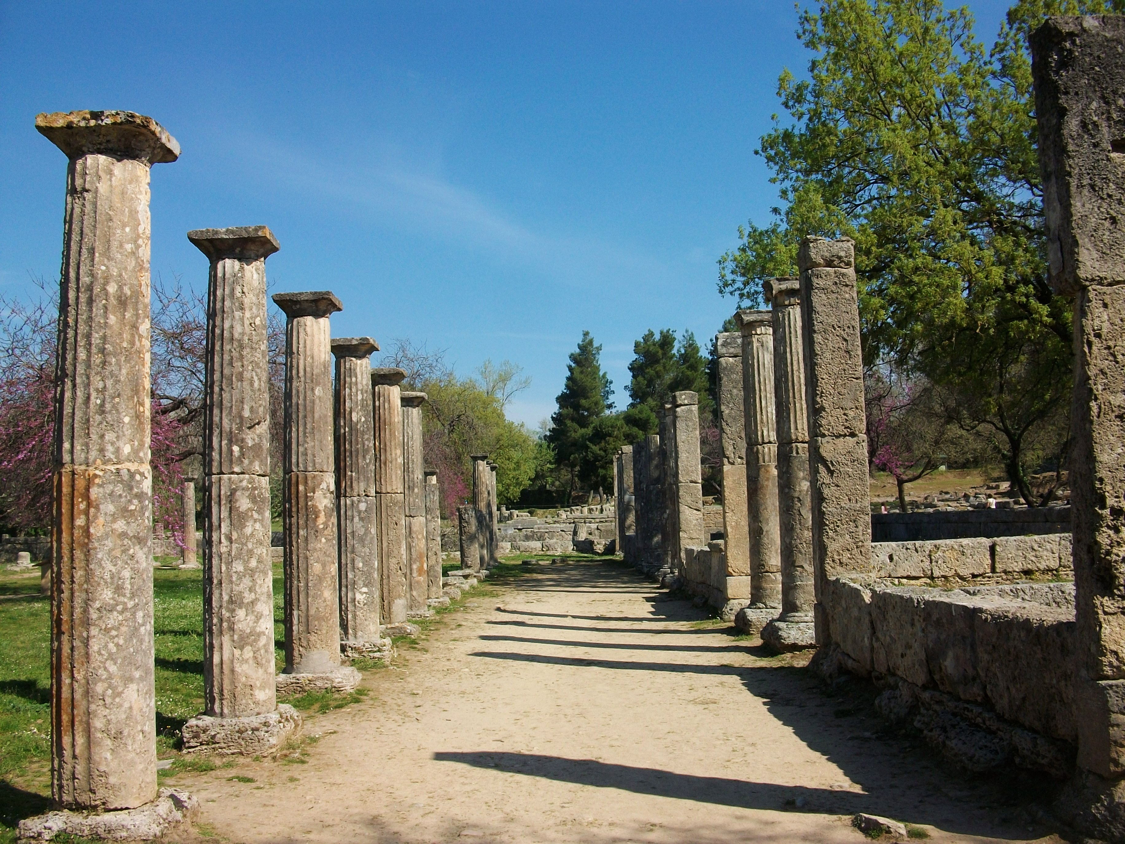 Palestra d'Olímpia.